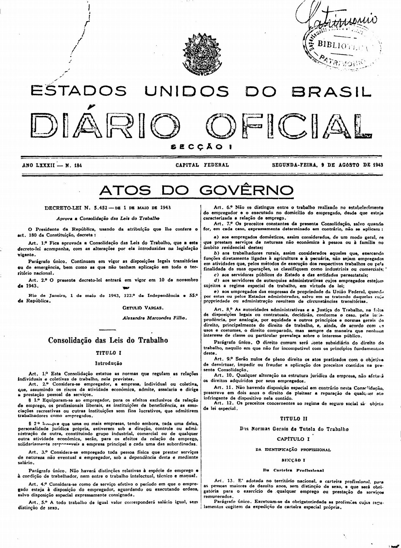 Página 11.937 do Diário Oficial, de 9 de agosto de 1943, que publicou o Decreto-Lei nº 5.452, de 1 de maio de 1943, que aprovou a Consolidação das Leis do Trabalho no Brasil.